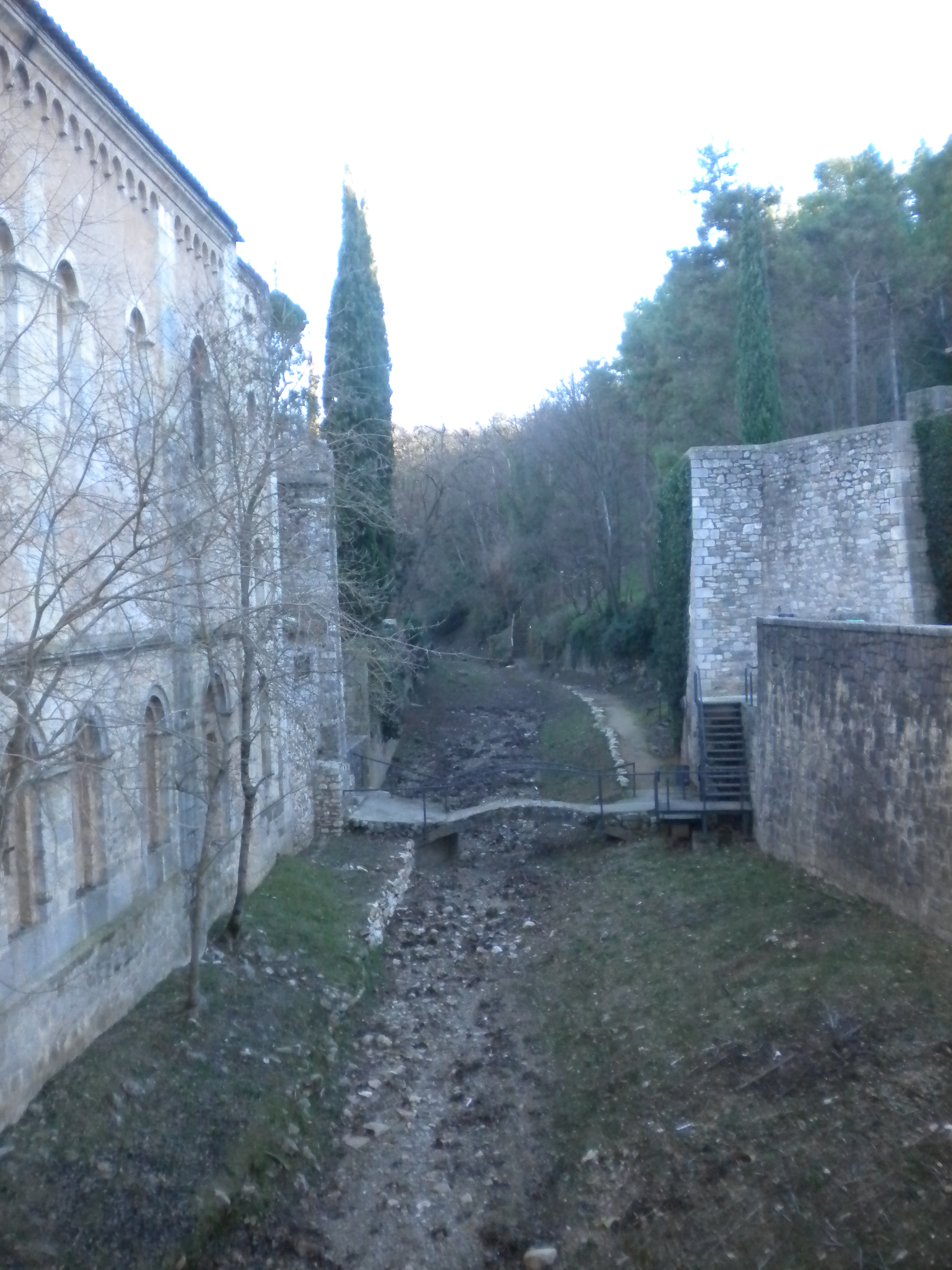 El Riu Galligants al seu pas per Girona.